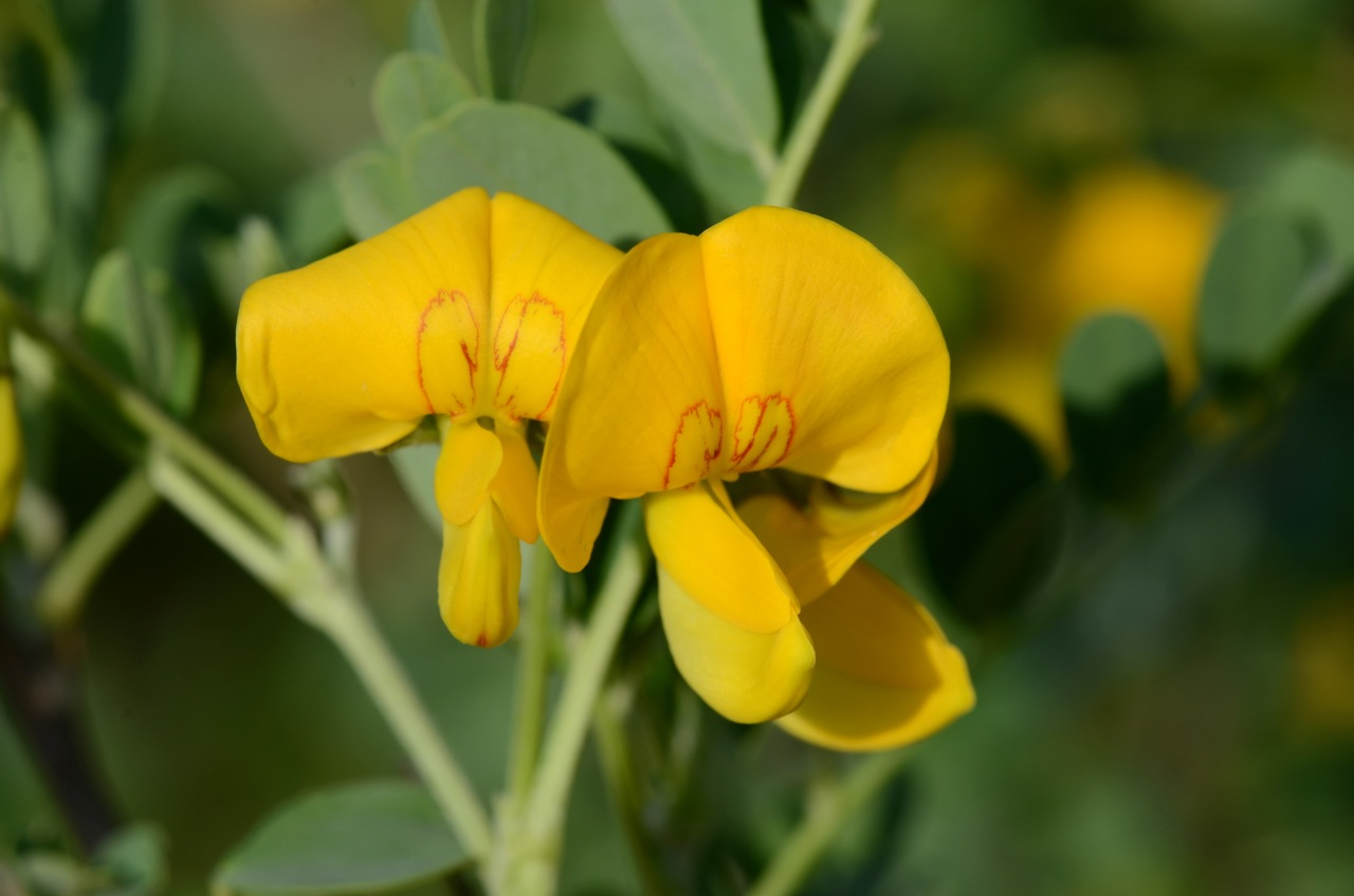 mitten in Wien - I